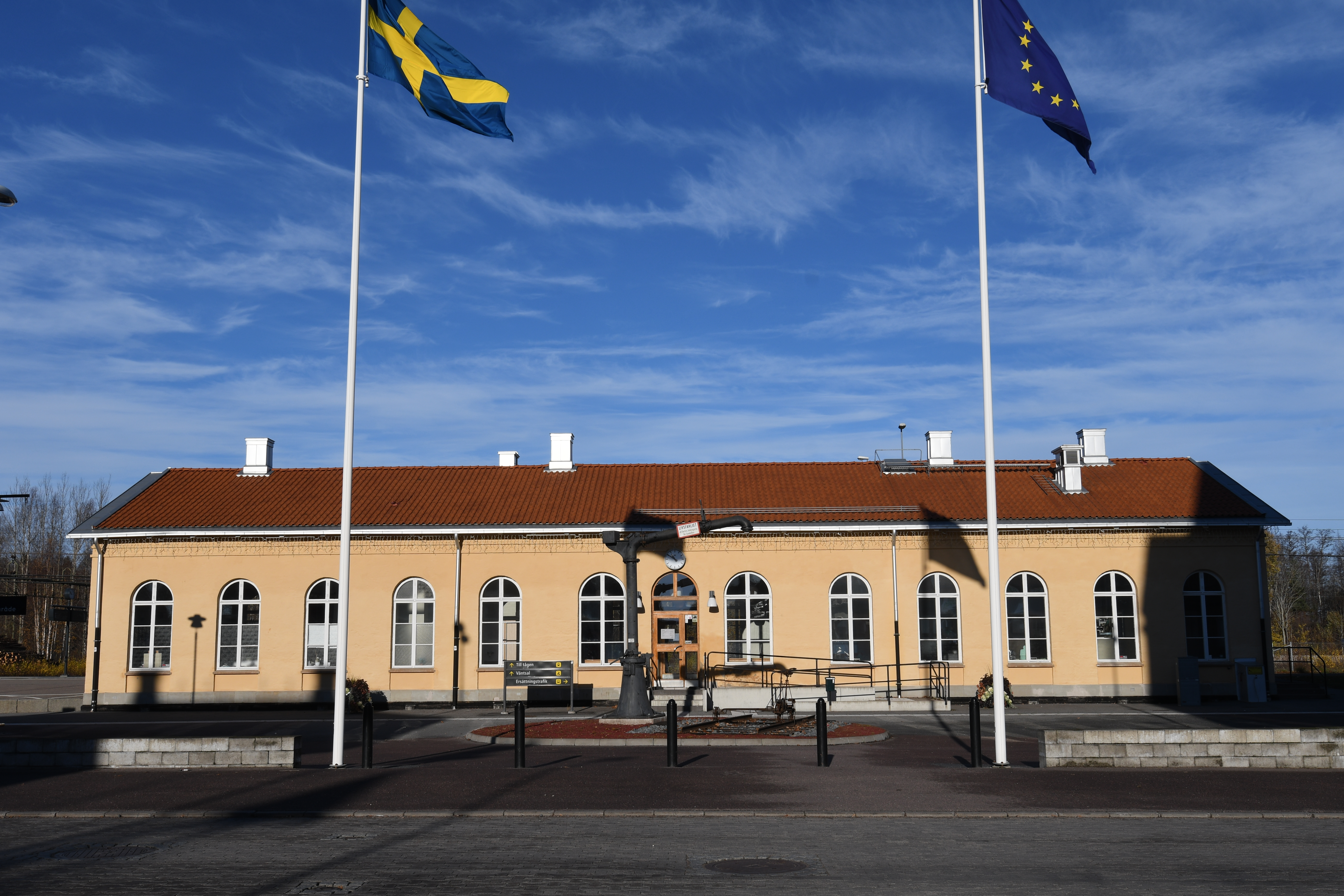 Laxå, november 2018. Järnvägsstationen.